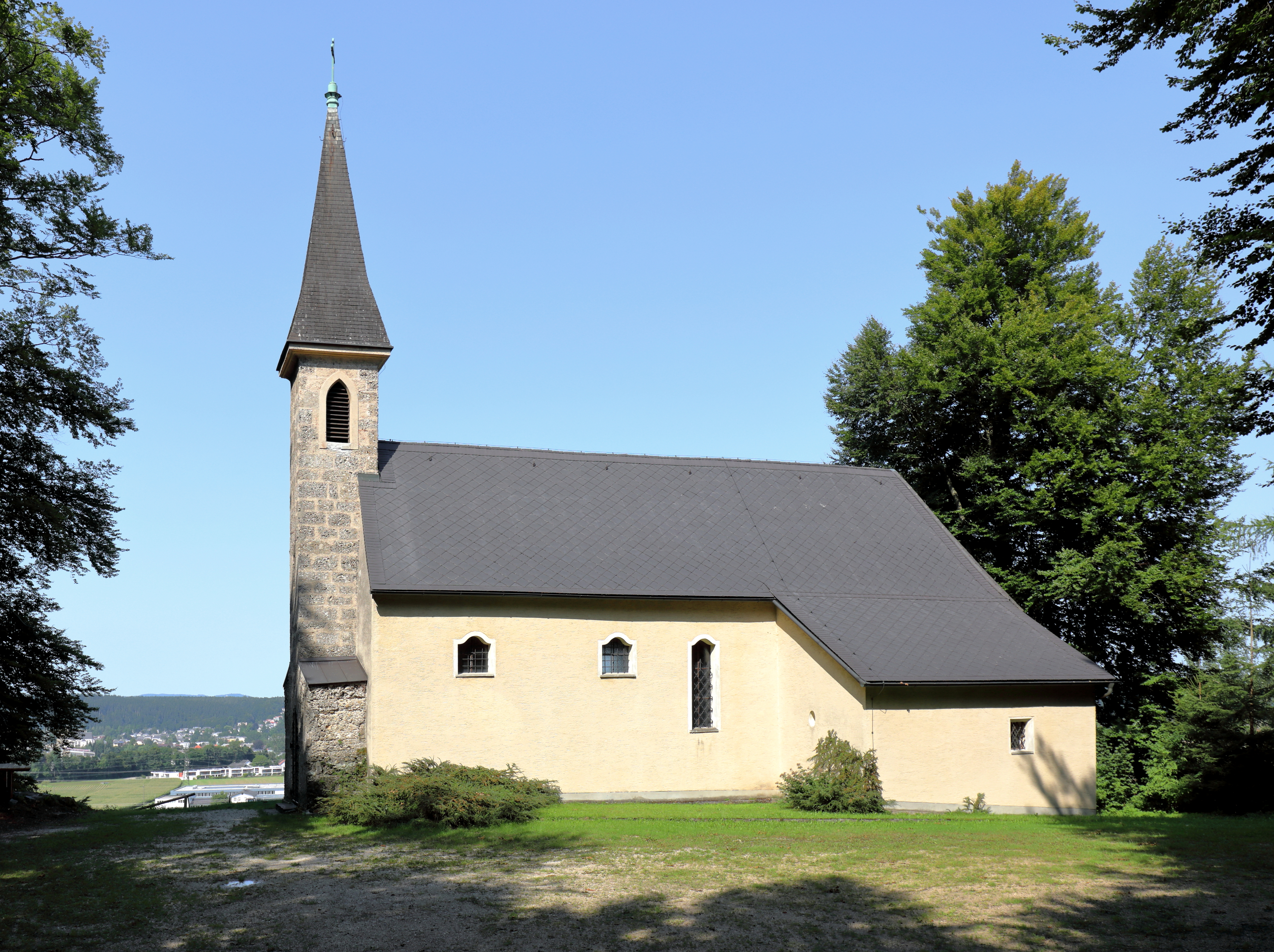 Die röm.-kath. Filialkirche St. Vitus in Oberregau, ein Ortsteil der oberösterreichischen Marktgemeinde Regau.Die Kirche wurde um 1500 errichtet. Der Altarraum ist rippengewölbt und das Langhaus hat eine barocke Flachdecke. Im Turm hängt eine Glocke aus dem 15. Jahrhundert mit gotischer Inschrift, diese hat als einzige Glocke der Pfarre die Glockenablieferungen der beiden Weltkriege überstanden.